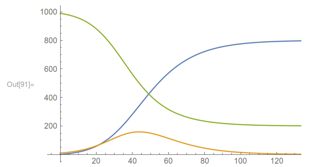 Modelo SIR con poblacion 1000, X(0)=10, l=1/5 y b=1/10